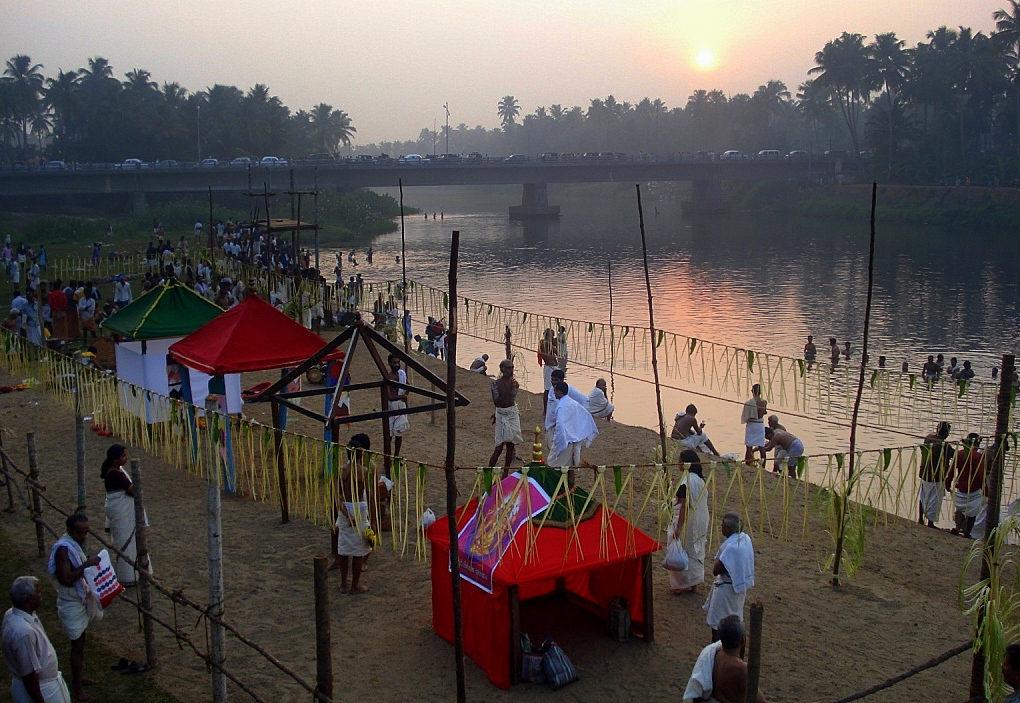 place where Arattu takes place